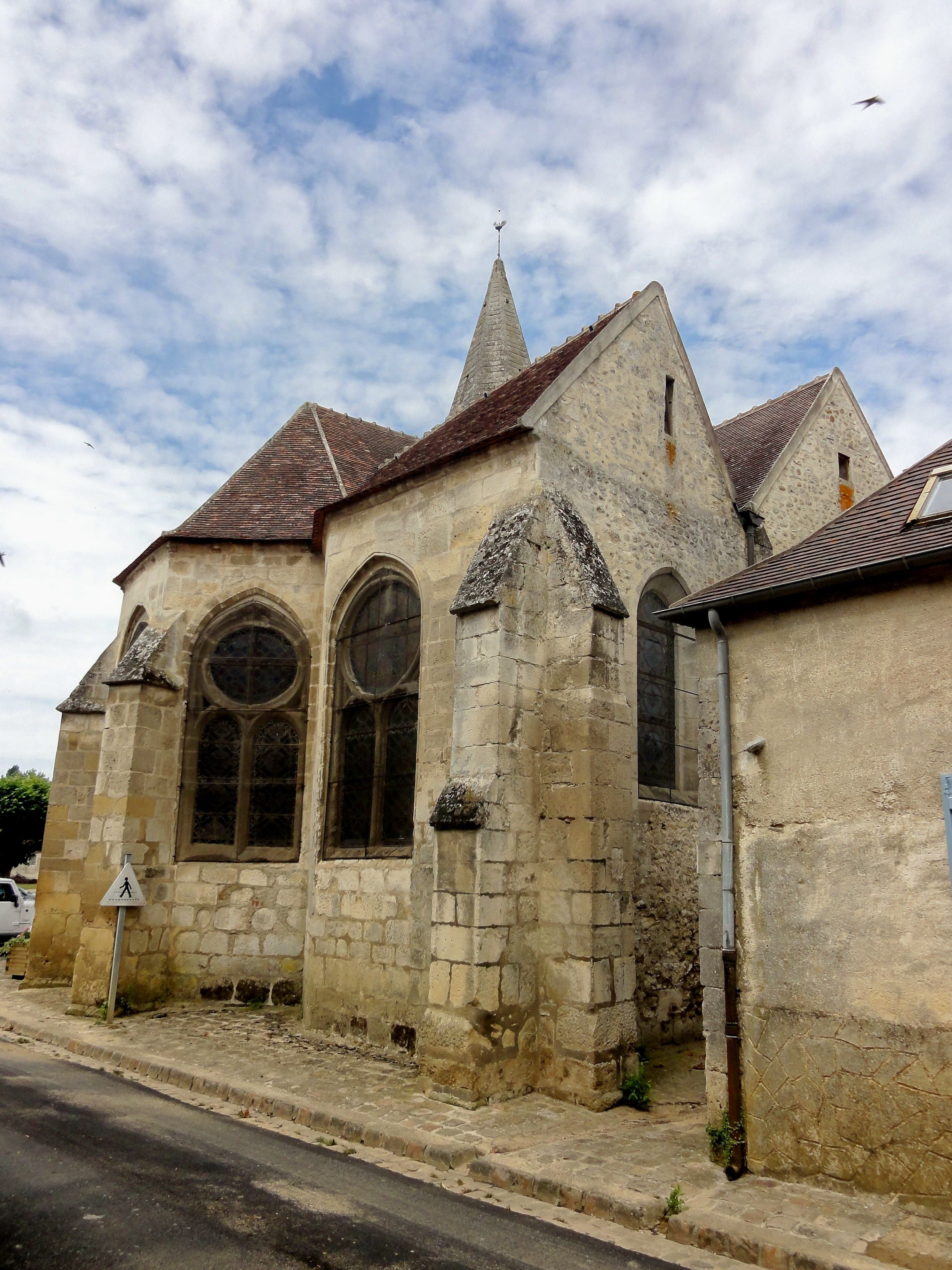 Chevet.